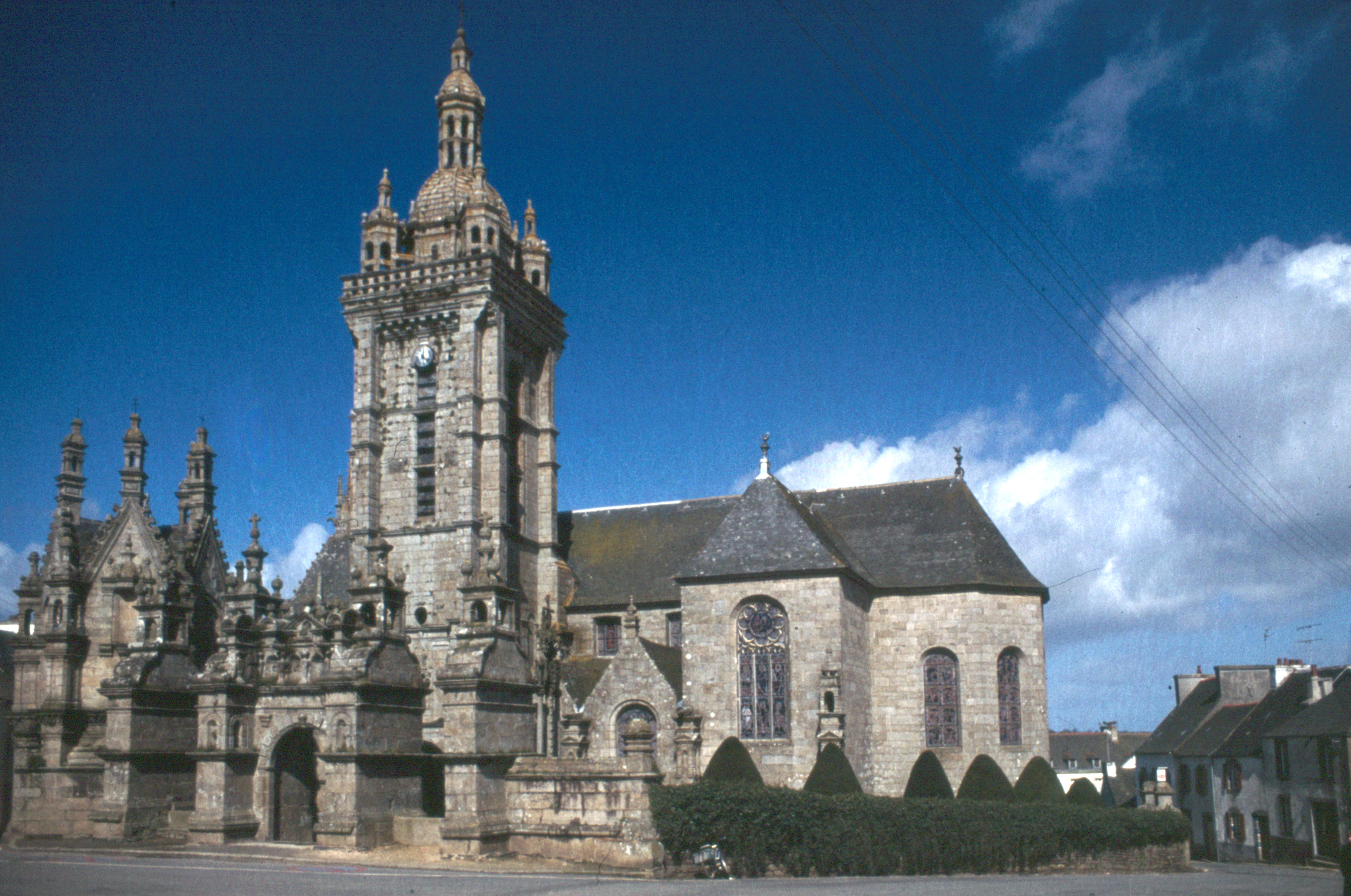 Saint-Thégonnec